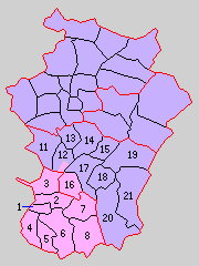 三重県名張郡・伊賀郡（後の名賀郡）の町村制時点の町村。